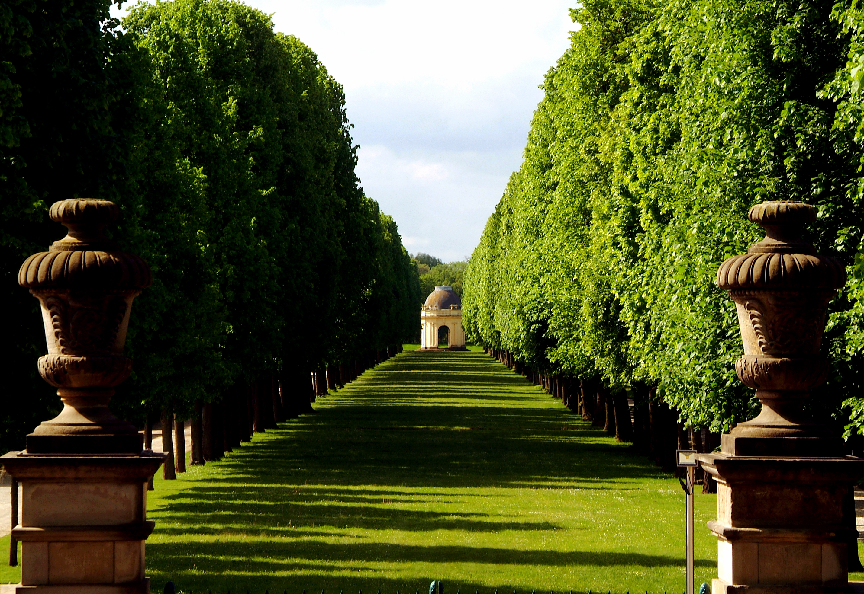 Blick von der Freitreppe des Hardenbergschen Hauses in die östliche Allee des Großen Gartens in Hannover-Herrenhausen in Richtung eines der Pavillons.